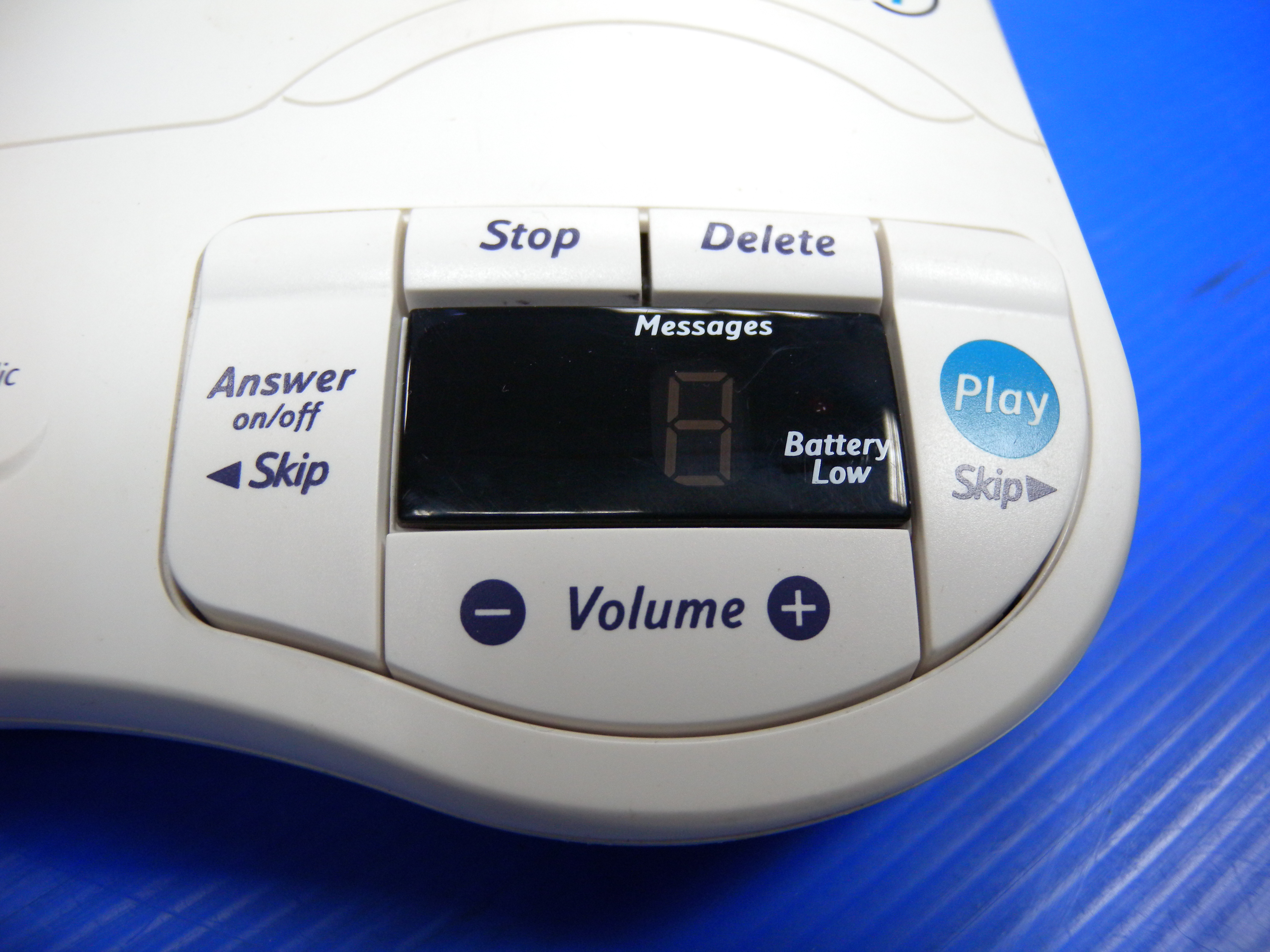 Цифровой автоответчик (фрагмент)